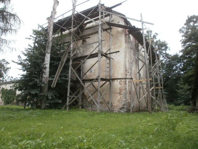 Vaade kirdest.